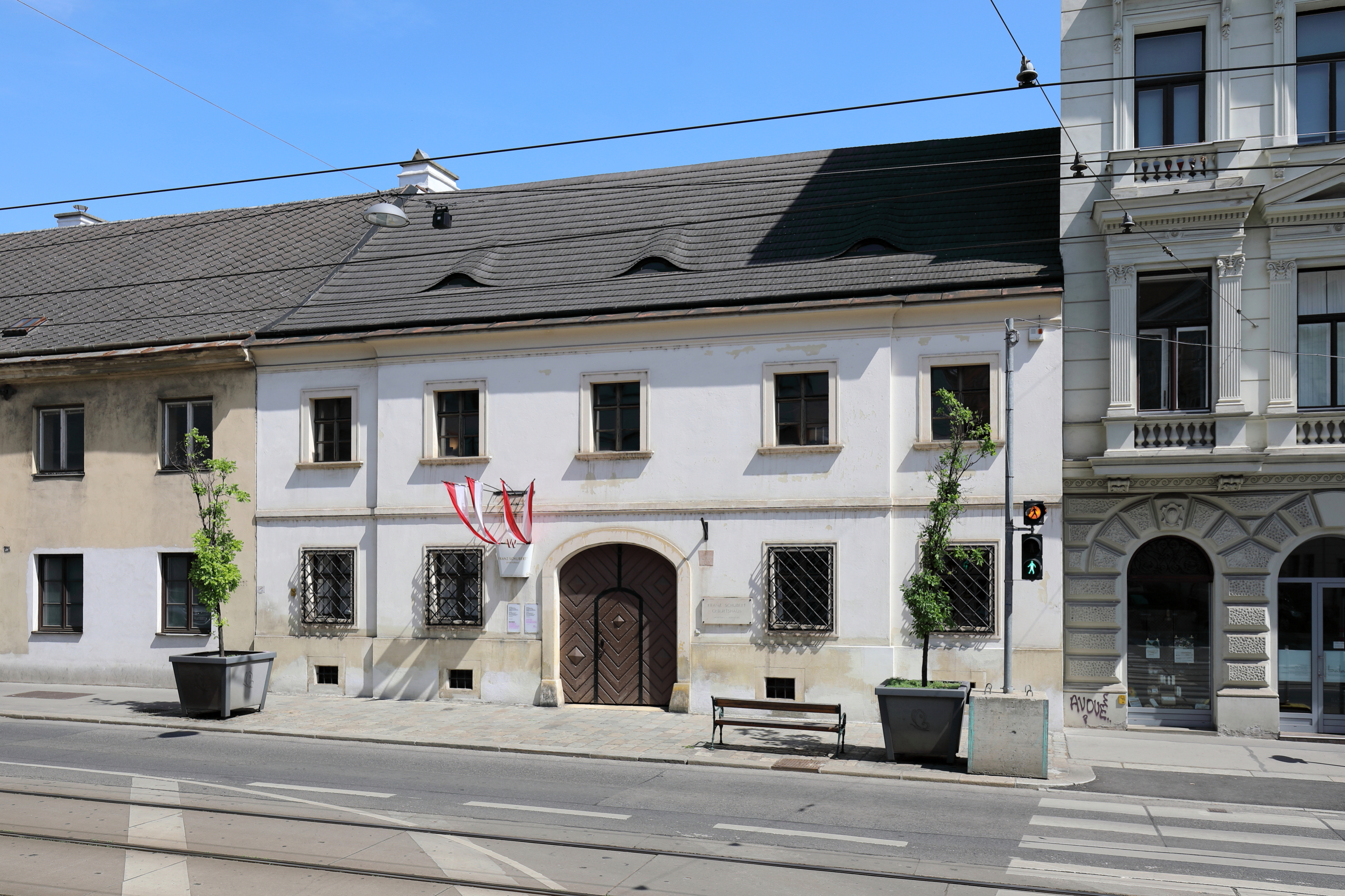 Das Geburtshaus des Komponisten Franz Schubert (31. Jänner 1797 geboren) am Himmelpfortgrund, heute Nußdorfer Straße 54 im 9. Wiener Gemeindebezirk Alsergrund. 1908 beschloss der Gemeinderat das Haus anzukaufen und darin ein Schubertmuseum einzurichten, das am 18. Juni 1912 eröffnet wurde und bis heute besteht.